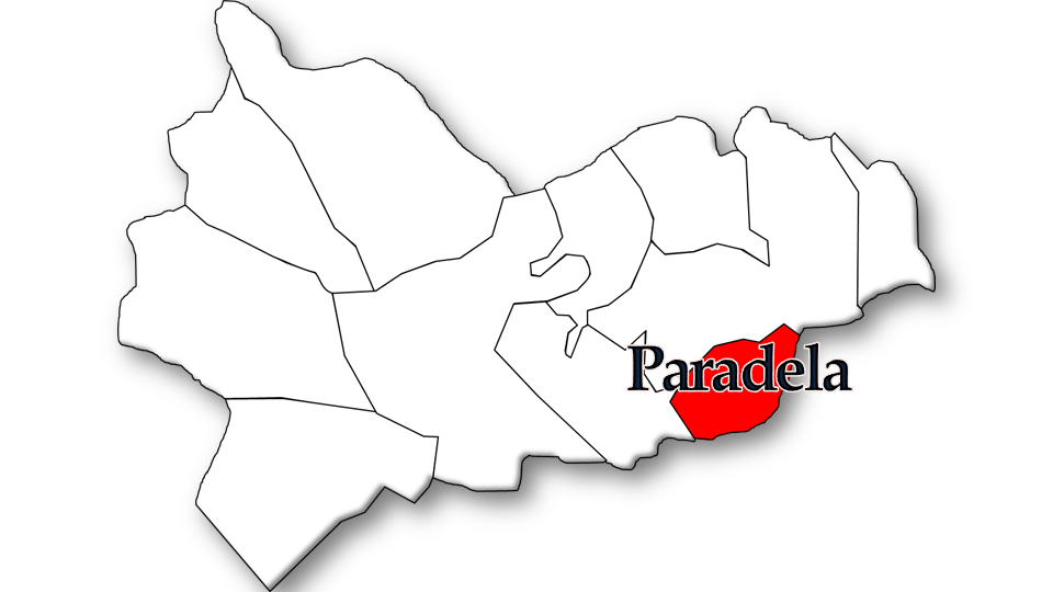 População